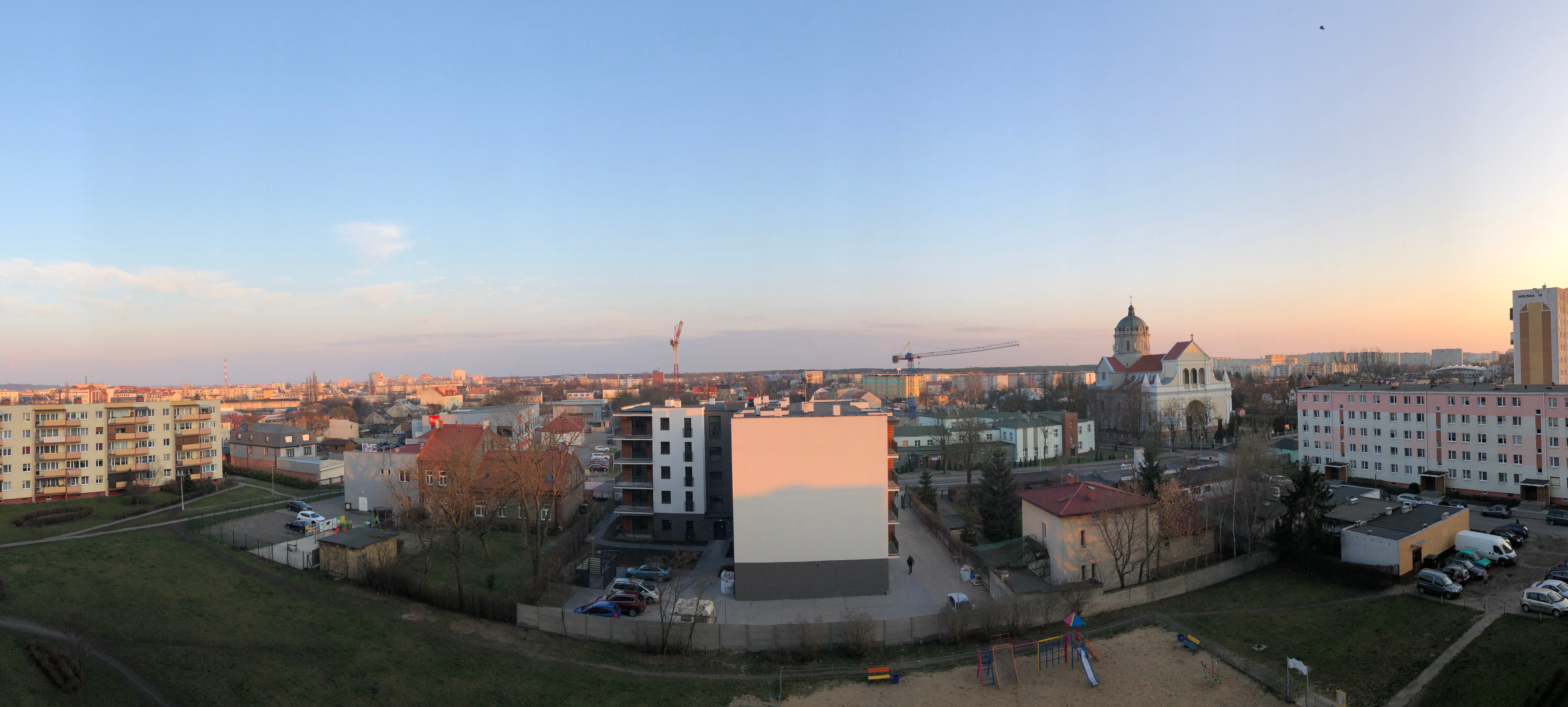 Nowy blok przy ul. Wiejskiej oraz dwa żurawie na placu budowy sądu przy ul. Żeromskiego (2020)